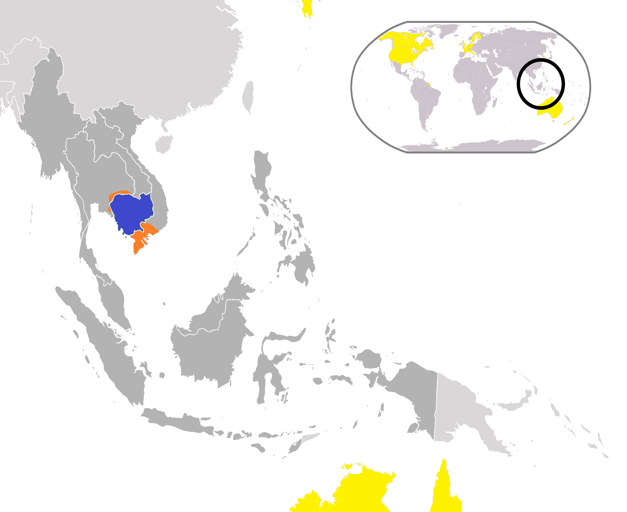 Implémentation de la langue khmère; en bleu, langue officielle, en orange, langue de minorité et en jaune présence d'une diaspora